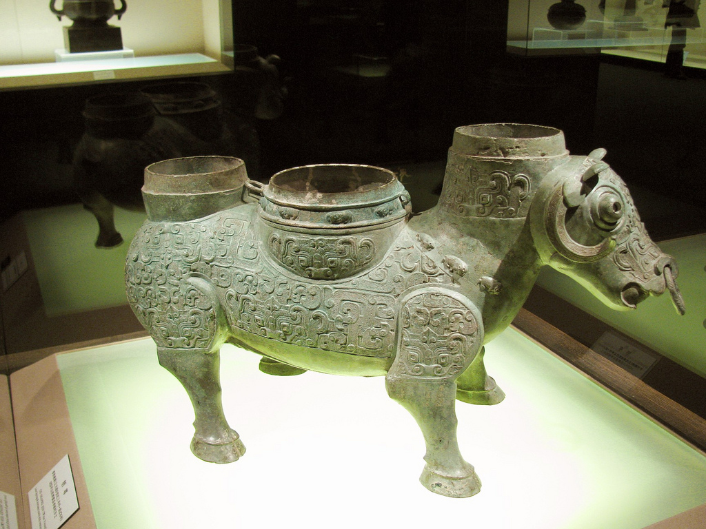 上海博物馆青铜馆